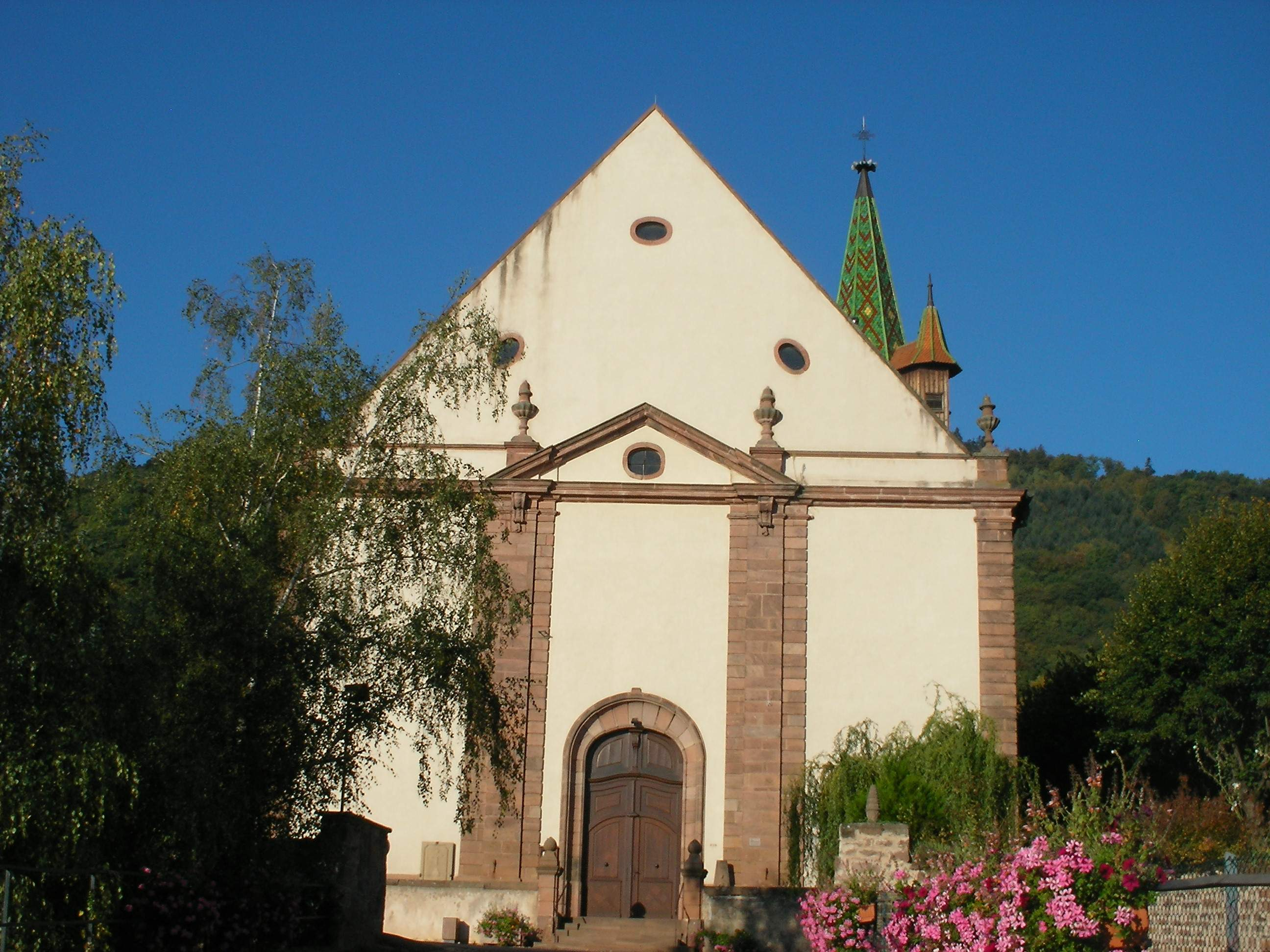 Église à Châtenois (Bas-Rhin, France).